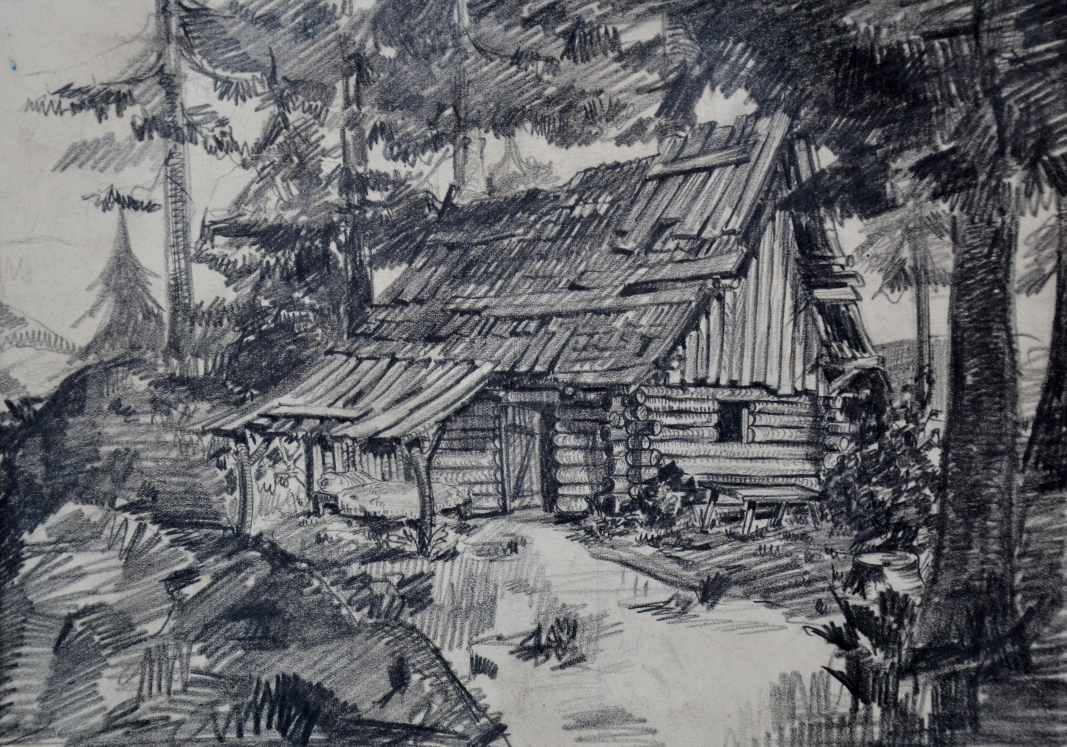 Gyimesi vadvirág (Ráthonyi Ákos, 1939) - Sőrés Imre díszletterve.